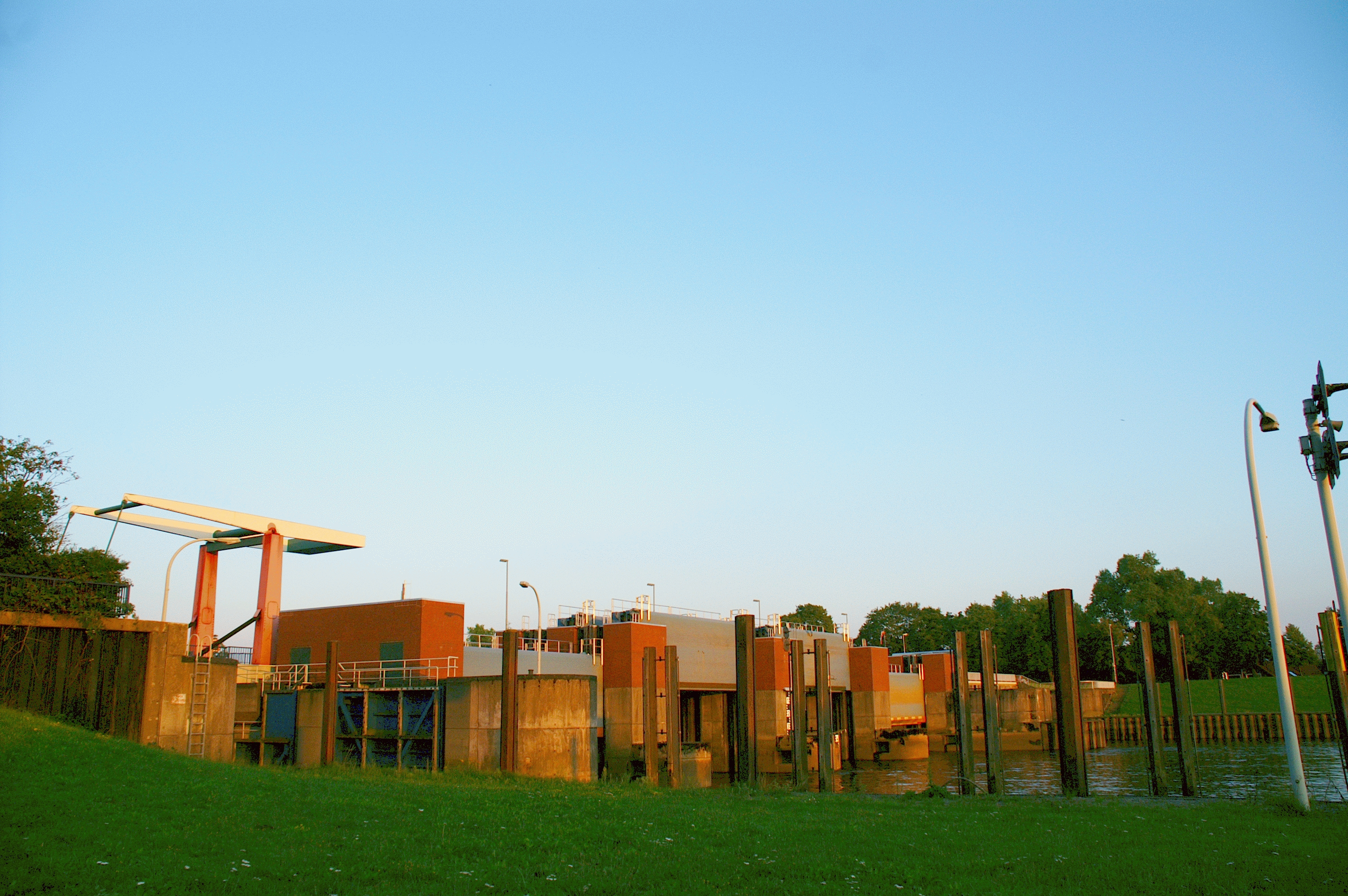 das Lesumsperrwerk über den Fluss Lesum bei Bremen-Grohn von Westen aus gesehen.